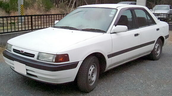 7代目マツダ･ファミリアセダン